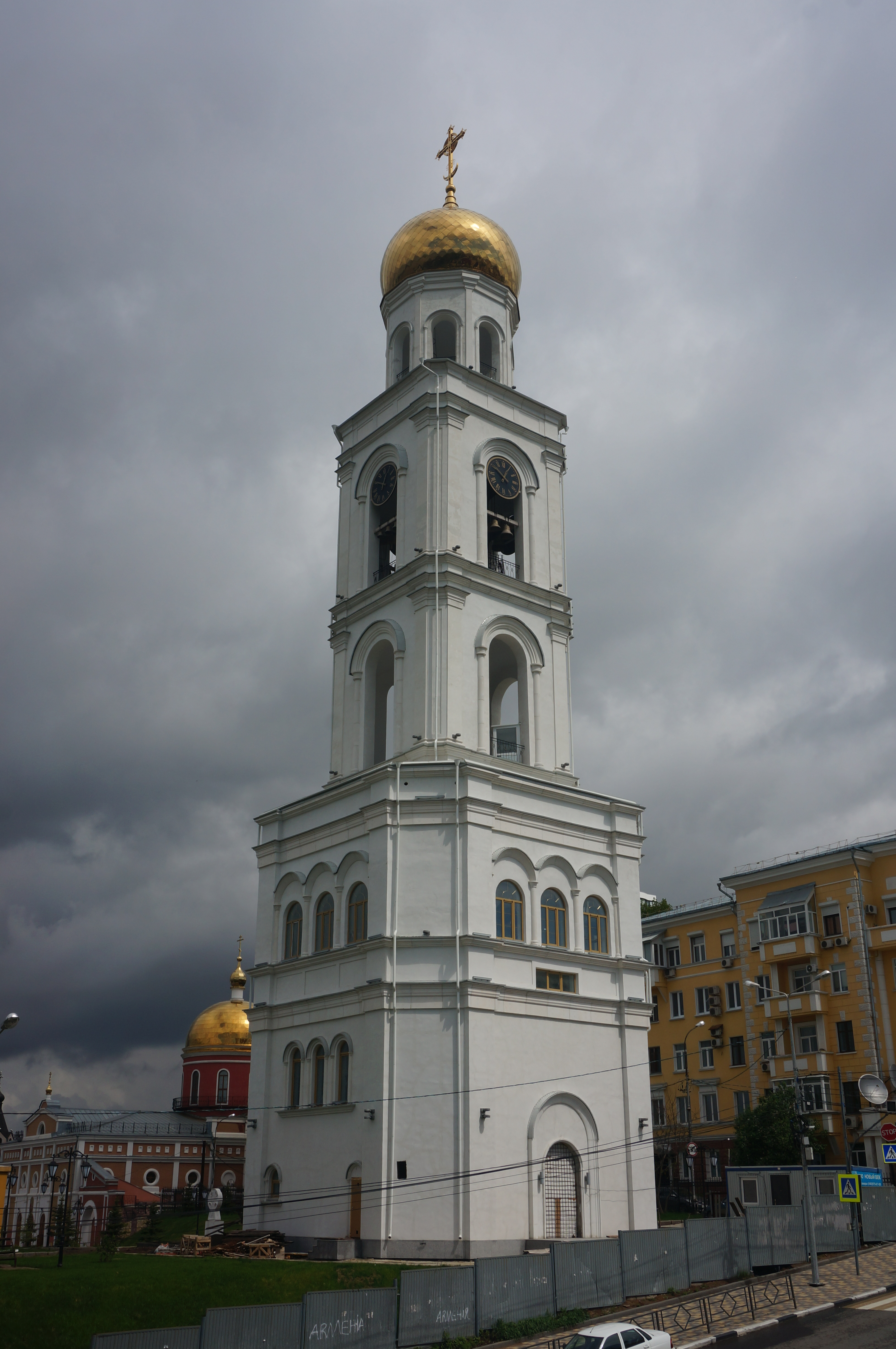 Иверский женский монастырь, Самара, Россия